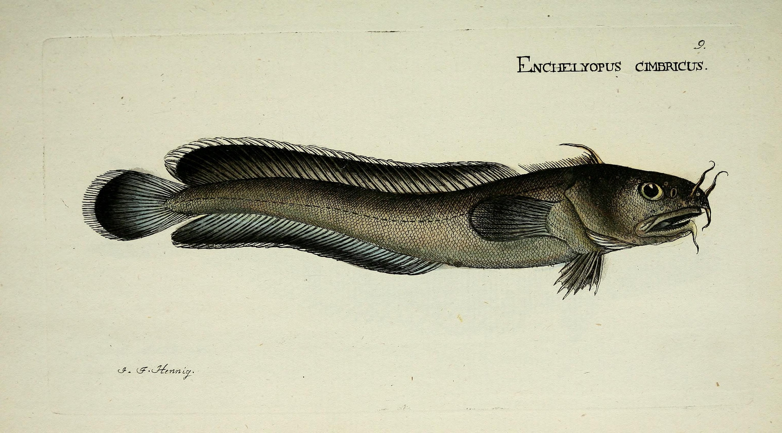 °v ■u B d -& ^§